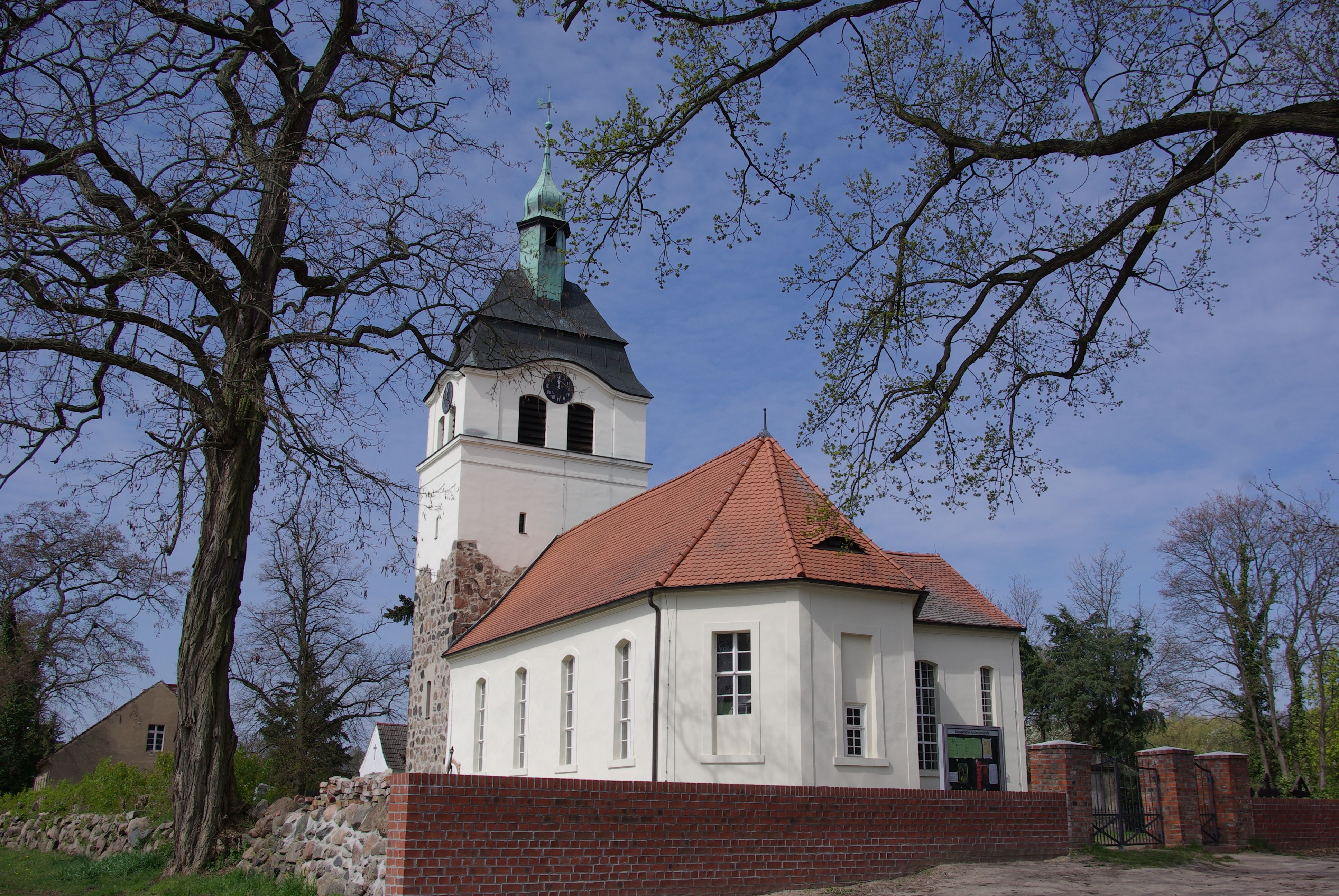 Groß Kreutz Ortsteil Jerserig in Brandenburg. Die Kirche stamm aus dem 14. Jahrhundert und steth unter Denkmalschutz.